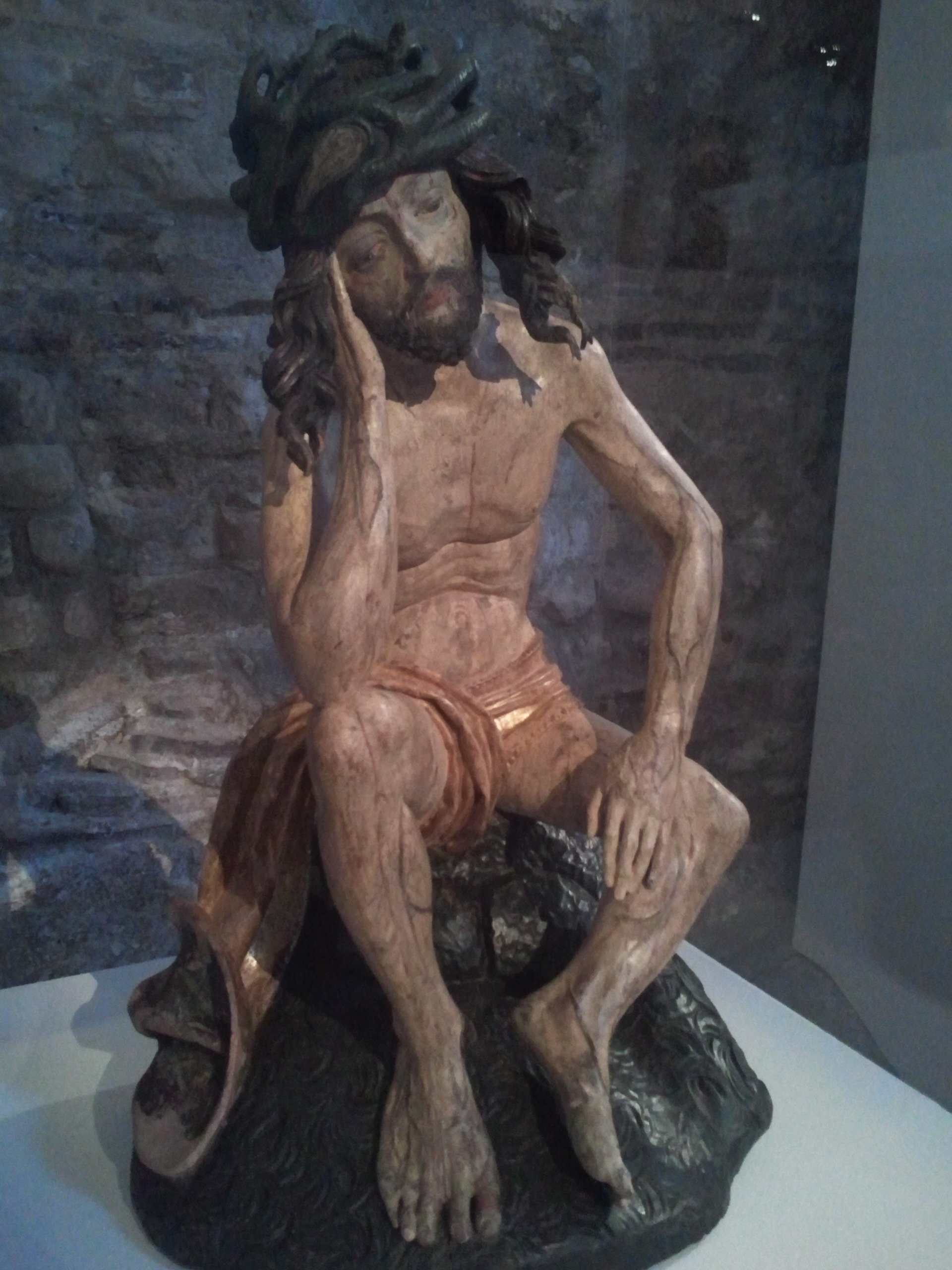 Statue polychrome en tilleul du Christ en méditation, réalisée par Paul de Levoča vers 1520 pour l’église catholique romaine Saint-Nicolas de la ville de Prešov, à l’est de la Slovaquie, présentée à Paris au musée national du Moyen Âge dans le cadre de l’exposition D’or et de Feu, l’art en Slovaquie à la fin du Moyen Âge entre le 16 septembre 2010 et le 10 janvier 2011.